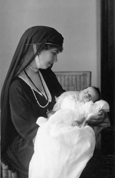 La princesa Alejandra en brazos de su abuela, Sofía de Prusia.